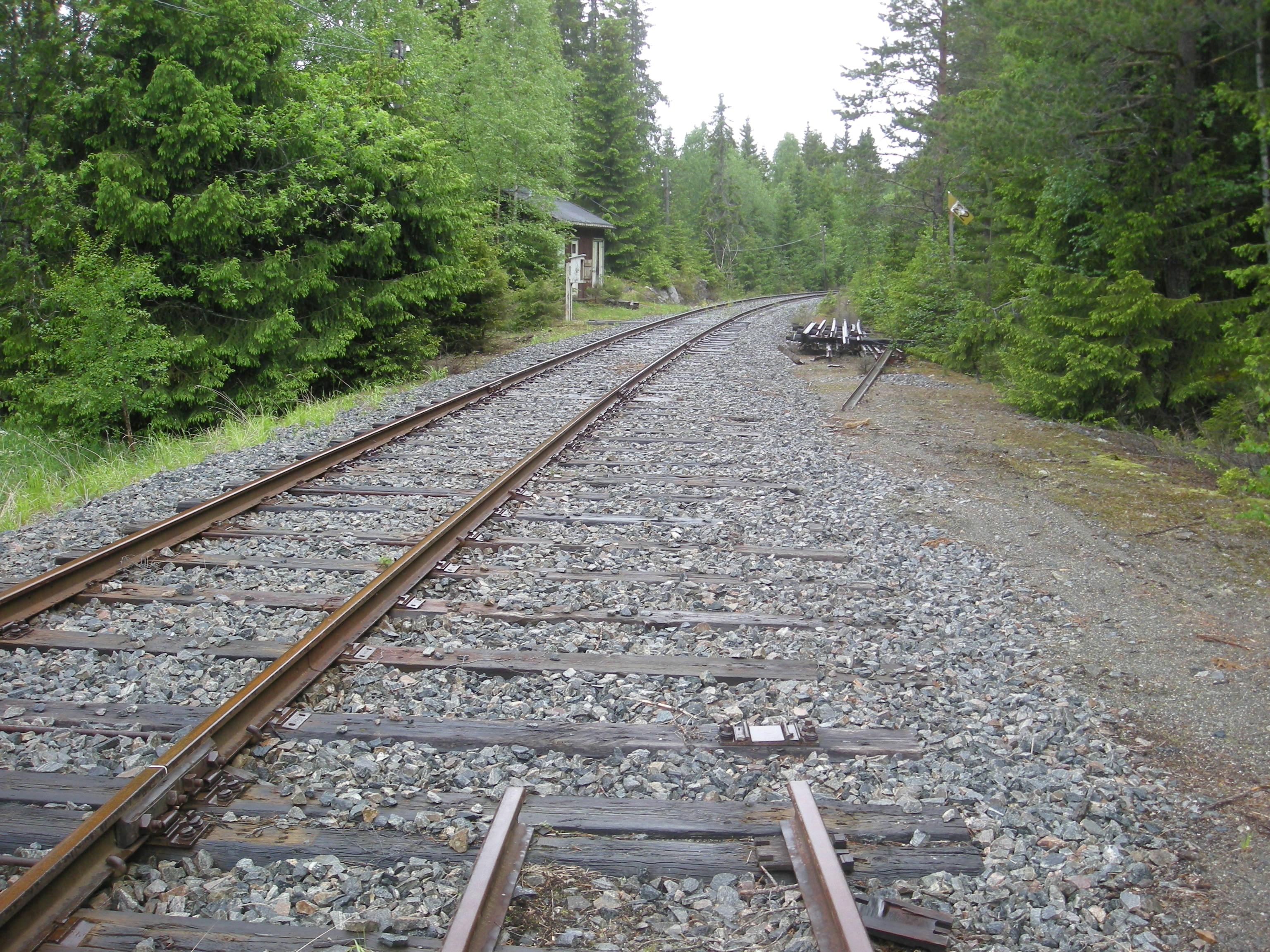 Skrukli stasjonsområde i 2010